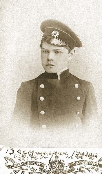 П.Н Черменский 3